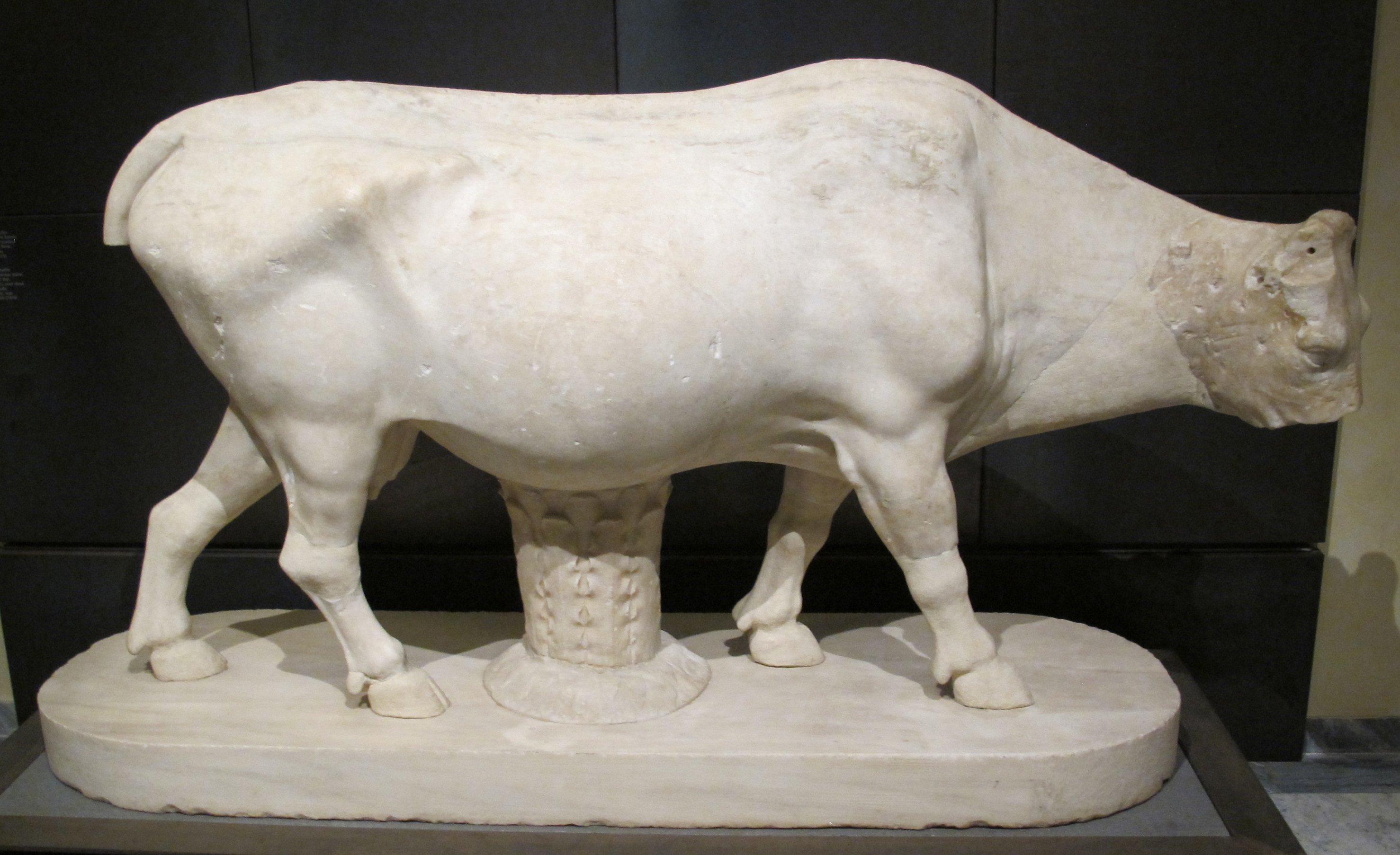 Musei Capitolini, statua di vacca. Inventario Sculture S 921. L'opera è considerata una replica della mucca bronzea realizzata da Mirone intorno al 450 a.C. per l'Acropoli di Atene in occasione delle feste Panatenee, portata a Roma all'epoca di Vespasiano.